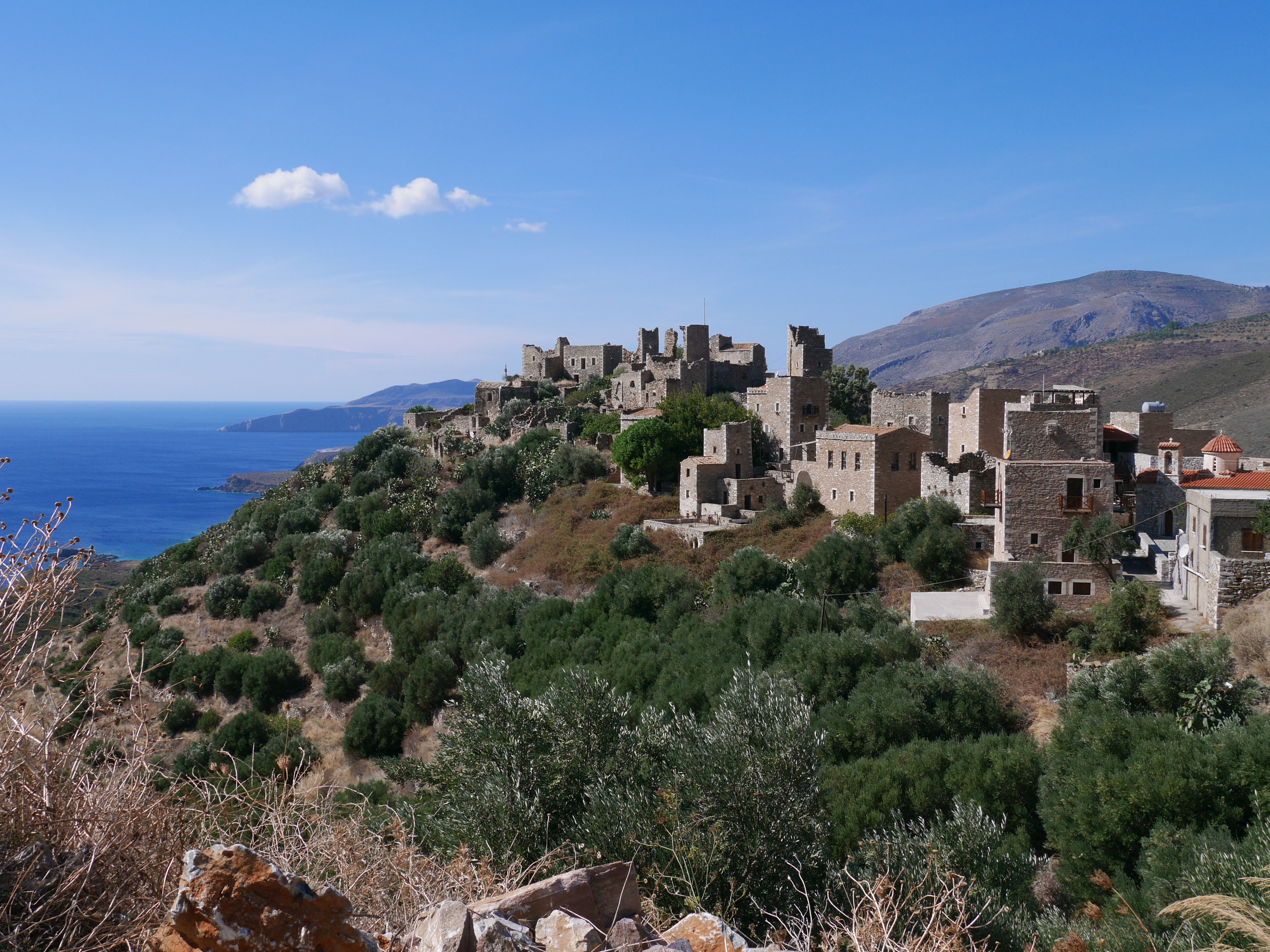 Vue d'ensemble du village